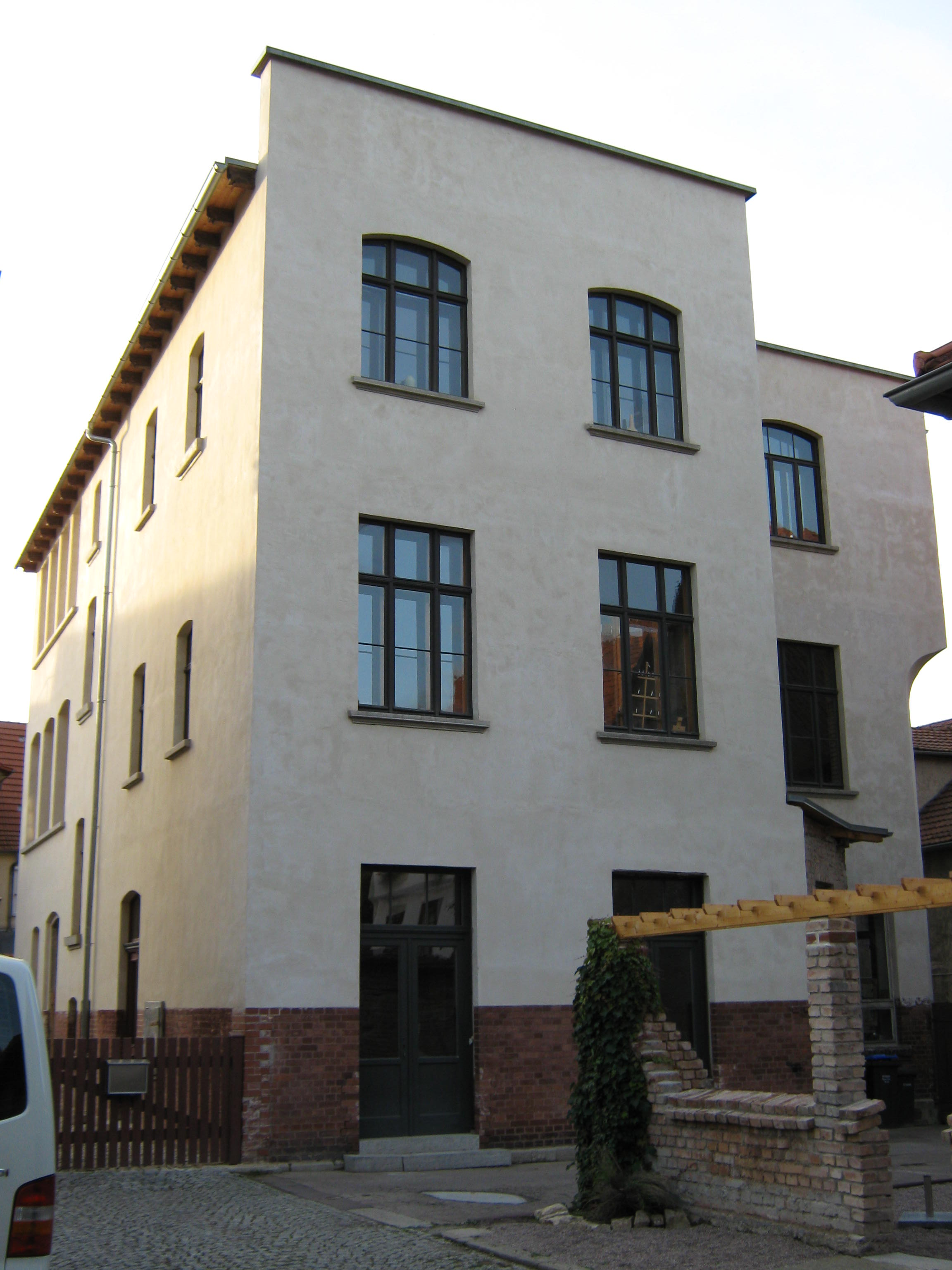 Ehemalige "Möller'sche Handschuhfabrik" beim Stadthaus Arnstadt.